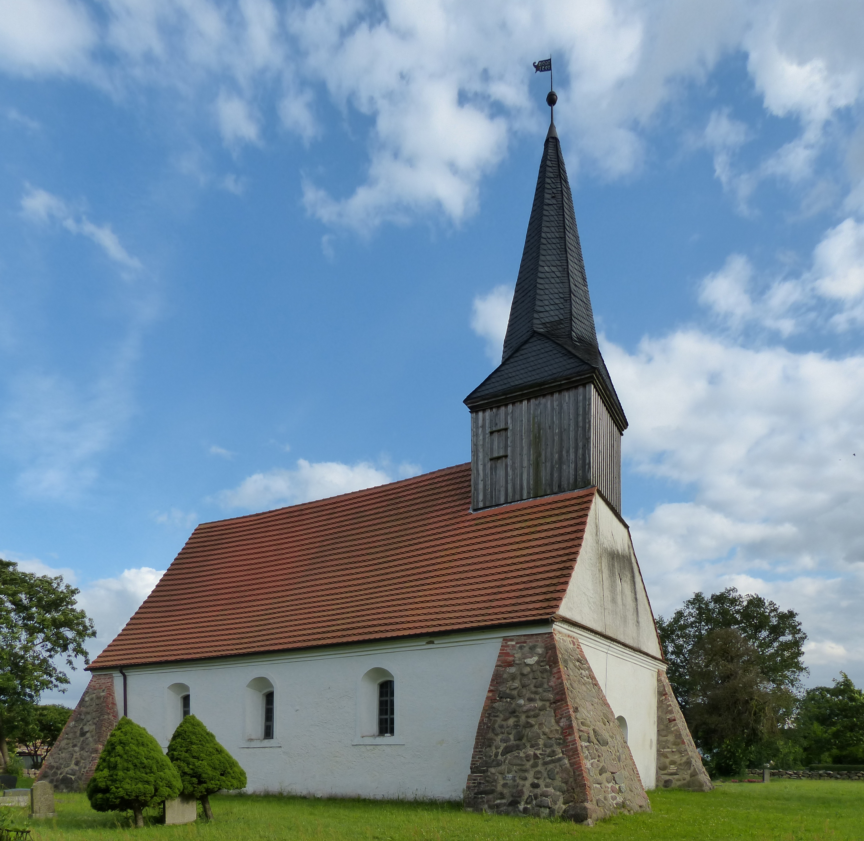 Kirche Rossin, Ansicht von Nordwesten